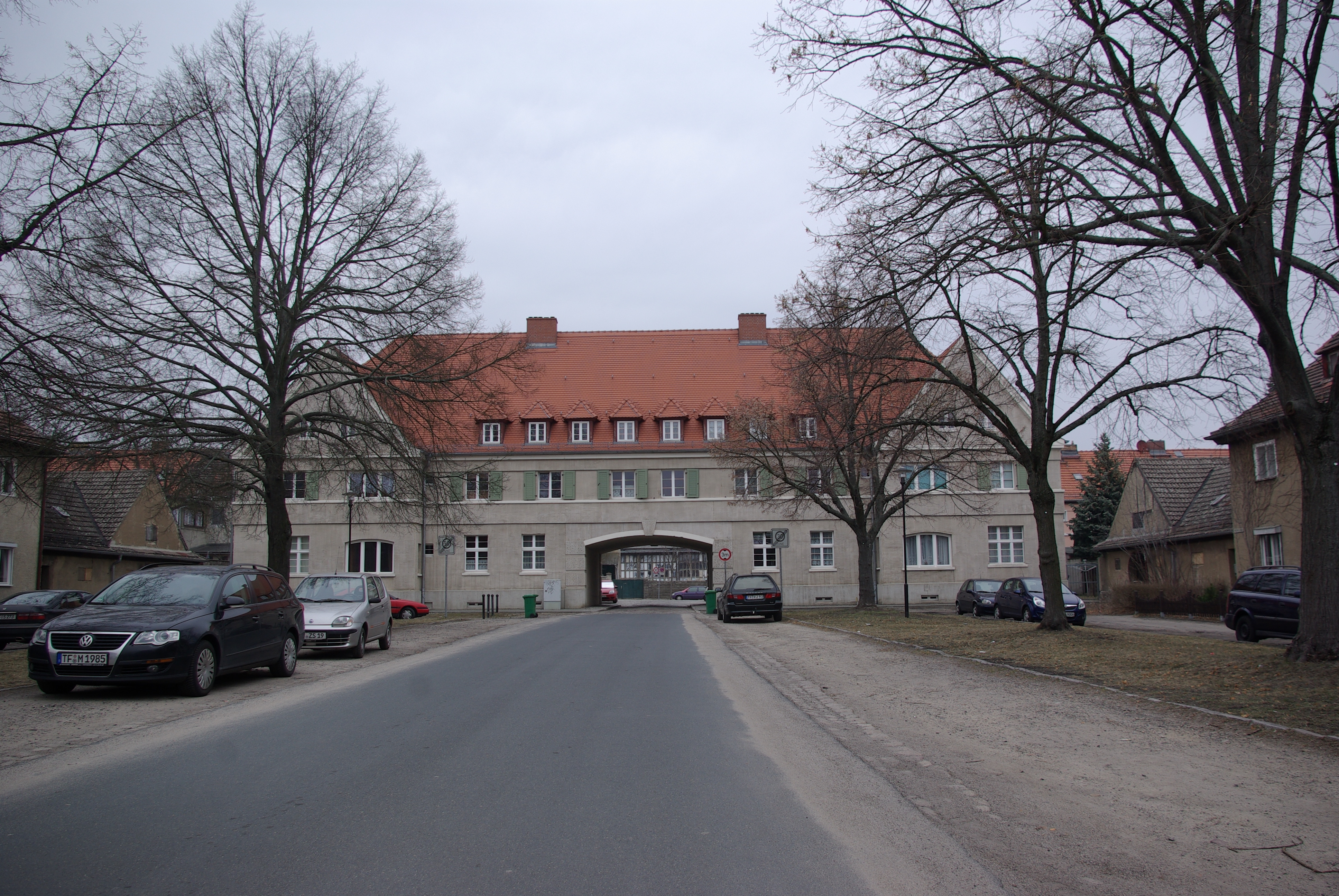 Luckenwalde in Brandenburg. Die Straße Auf dem Sande steht unter Denkmalschutz, wie auch die gesamte Siedlung Auf dem Sande.